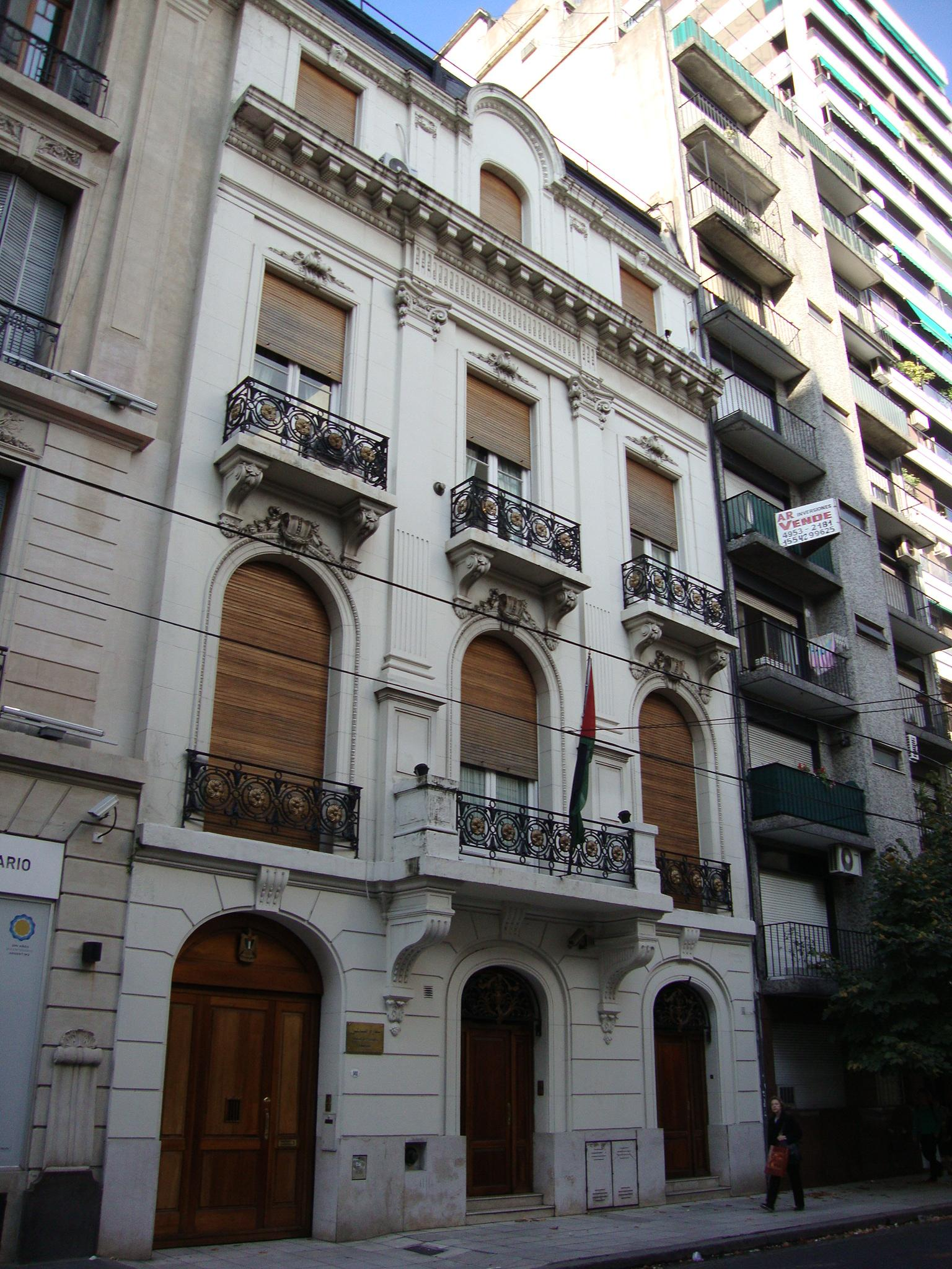 Edificio que funciona actualmente como Embajada de Palestina en la Argentina. Antigua residencia familiar, remodelada. Dirección: Riobamba 981. Arquitecto: Carlos Nordmann. Barrio de Recoleta, Buenos Aires.